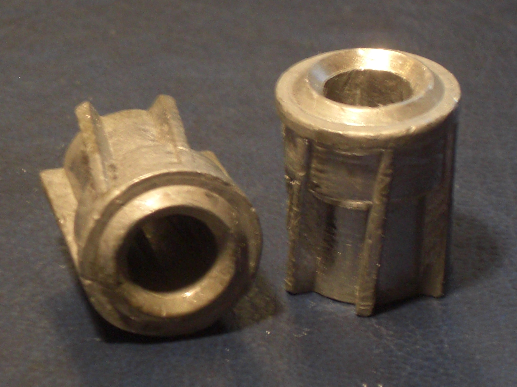 Mayera Slug